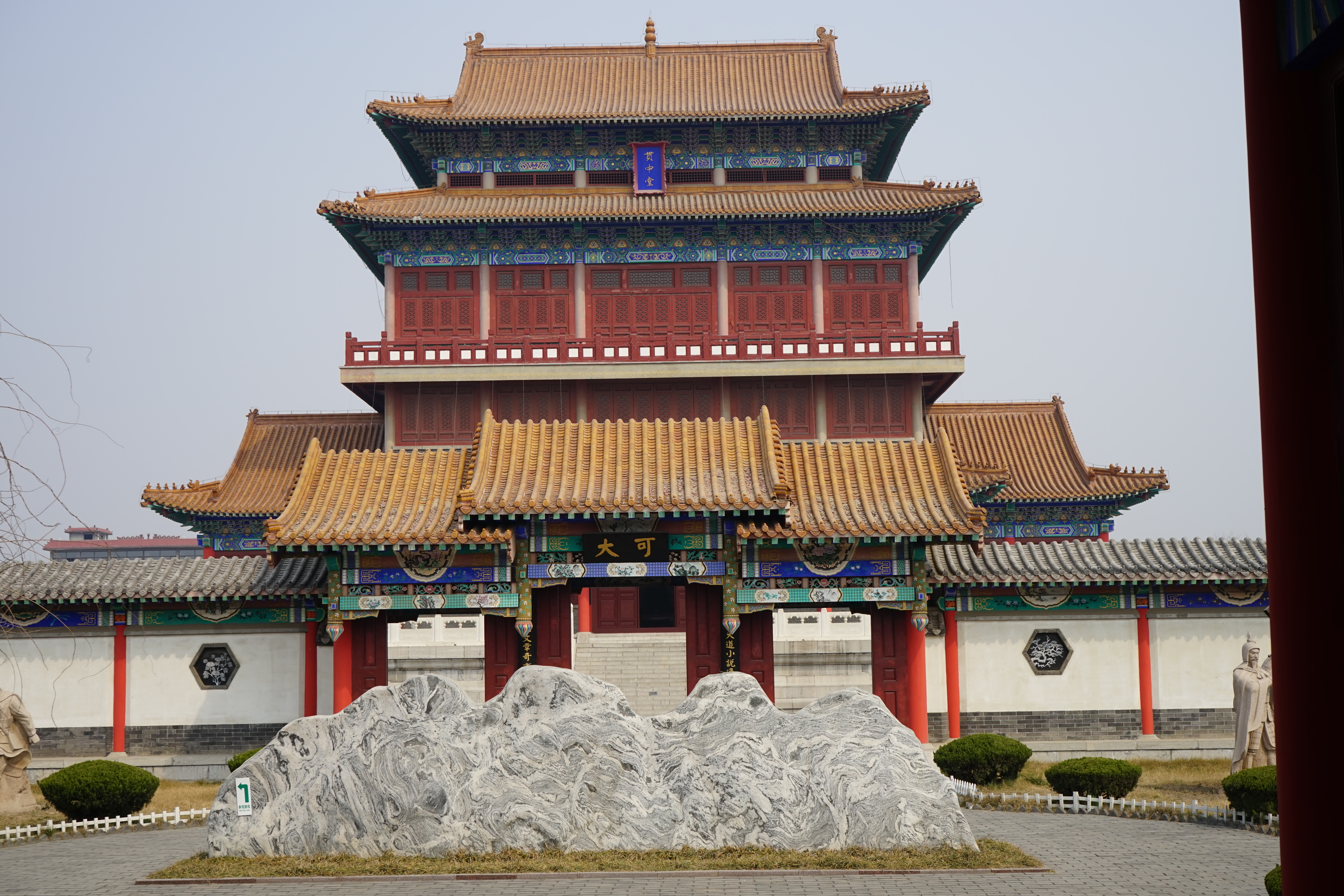 中文（中国大陆）: 罗贯中纪念馆·贯中堂。山东东平县